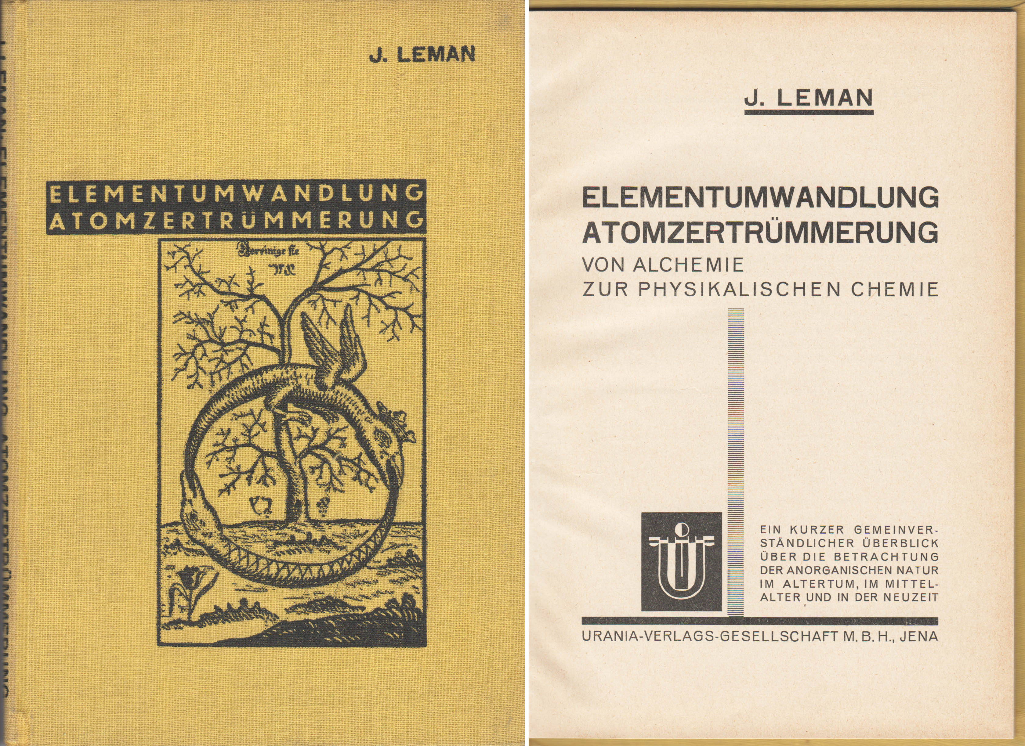 Elementeumwandlung Atomzertrümmerung von J. Leman Ausgabe 1928